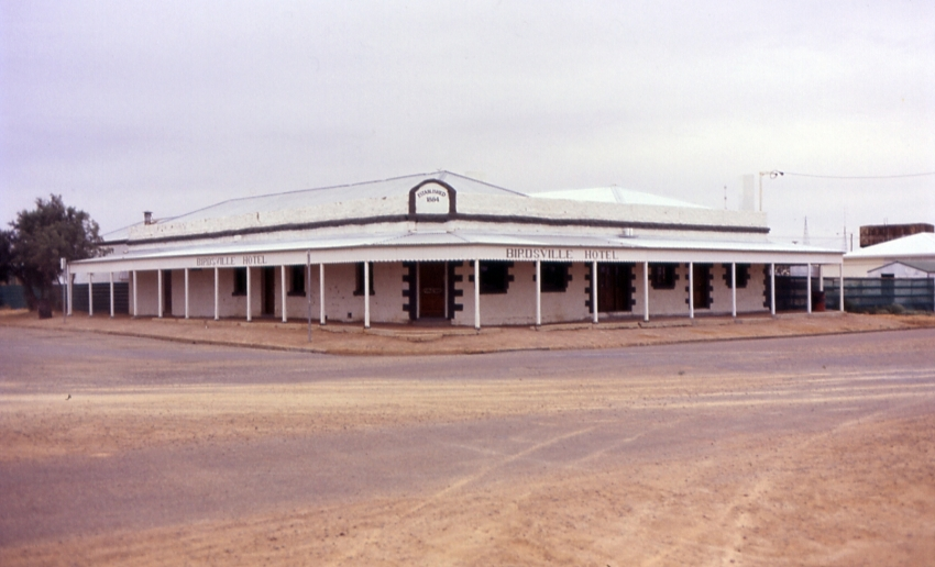 Birdsville hotel 100687